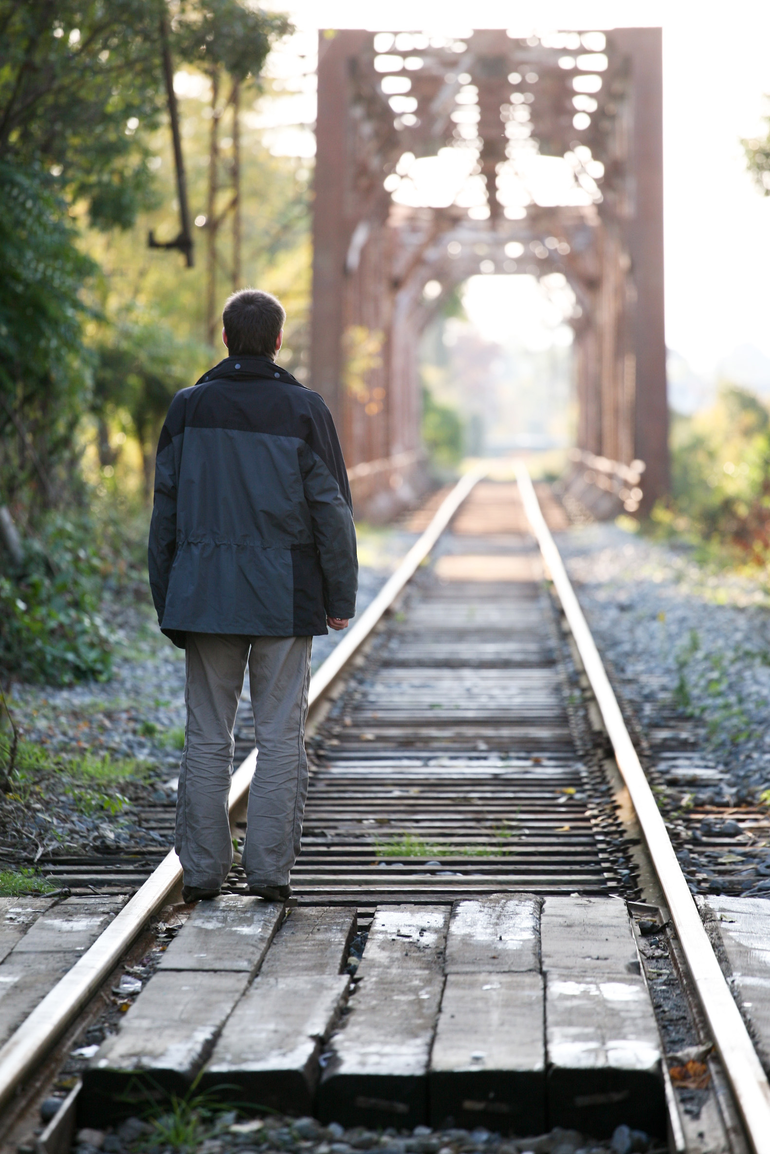 Sukhumi Abkhazia